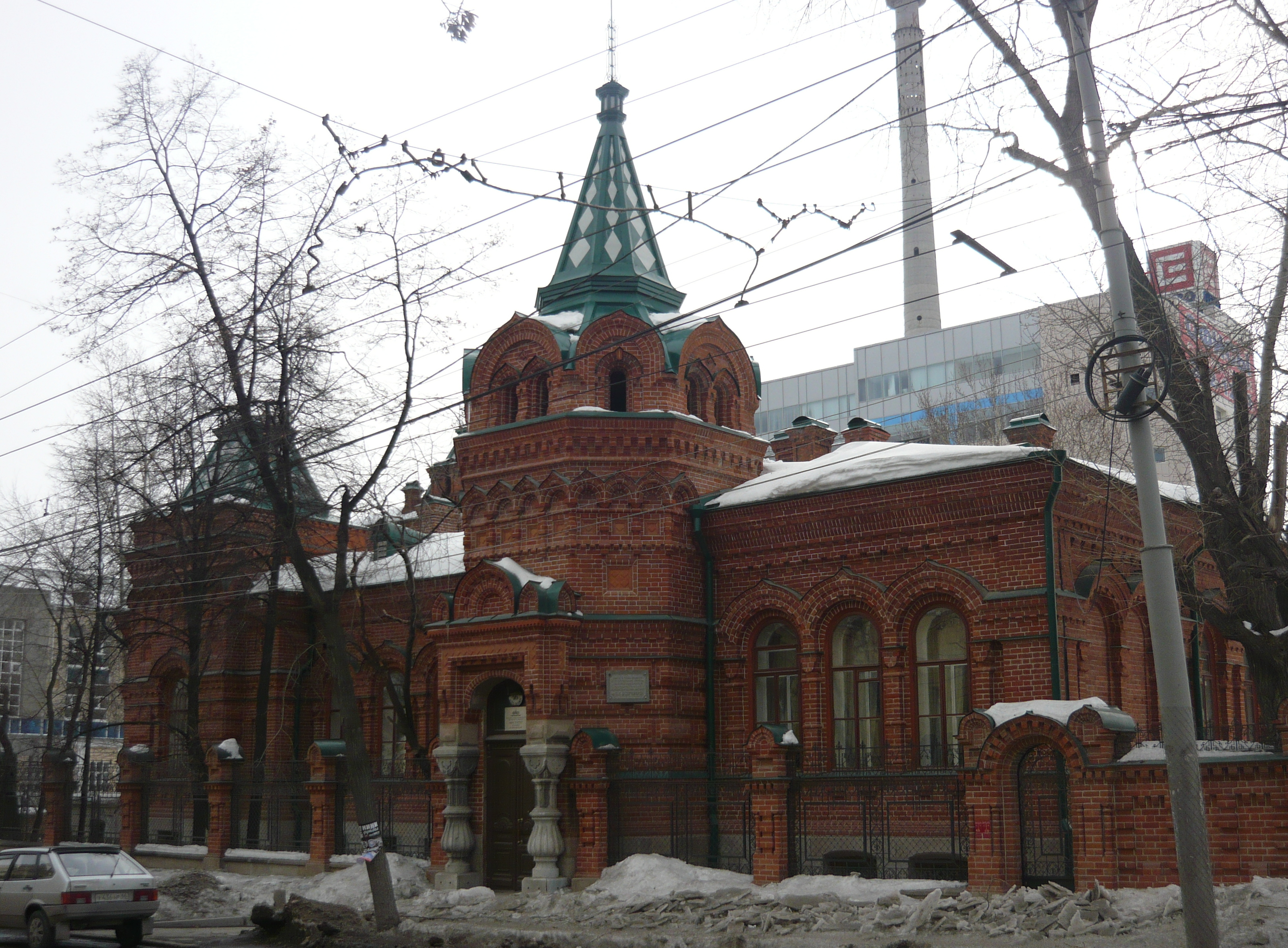 Усадьба Железнова: улица Розы Люксембург, 56, Екатеринбург, Свердловская область